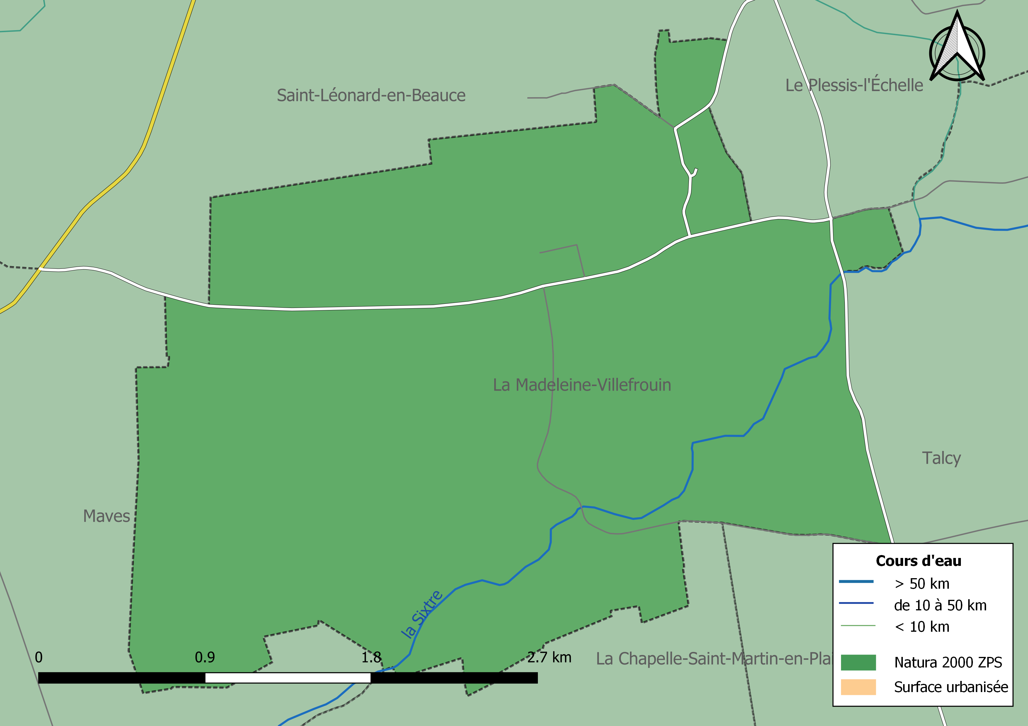 Carte du site Natura 2000 de type ZPS de la commune de La_Madeleine-Villefrouin (France).